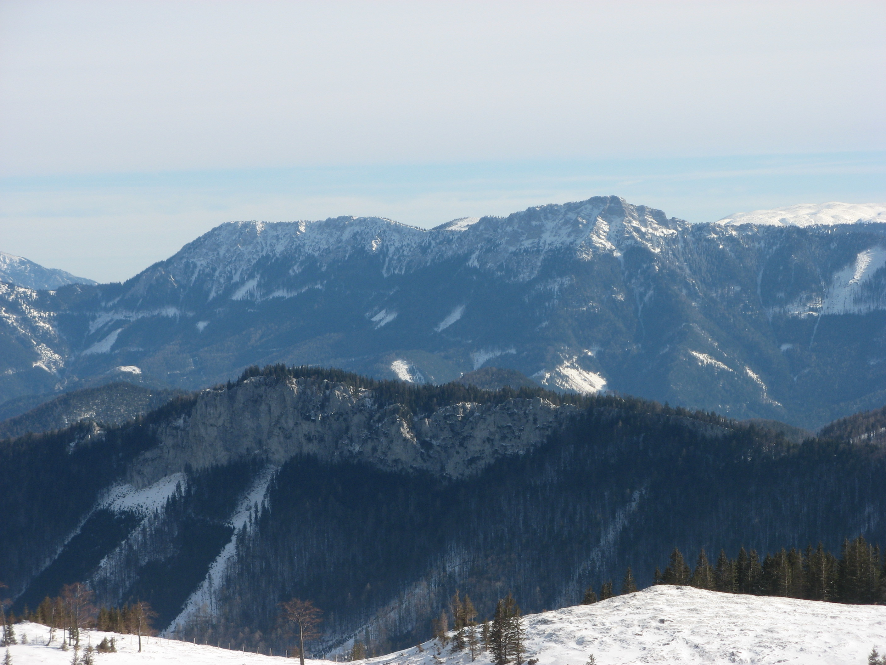 Am Horizont der Gippel von Norden aus